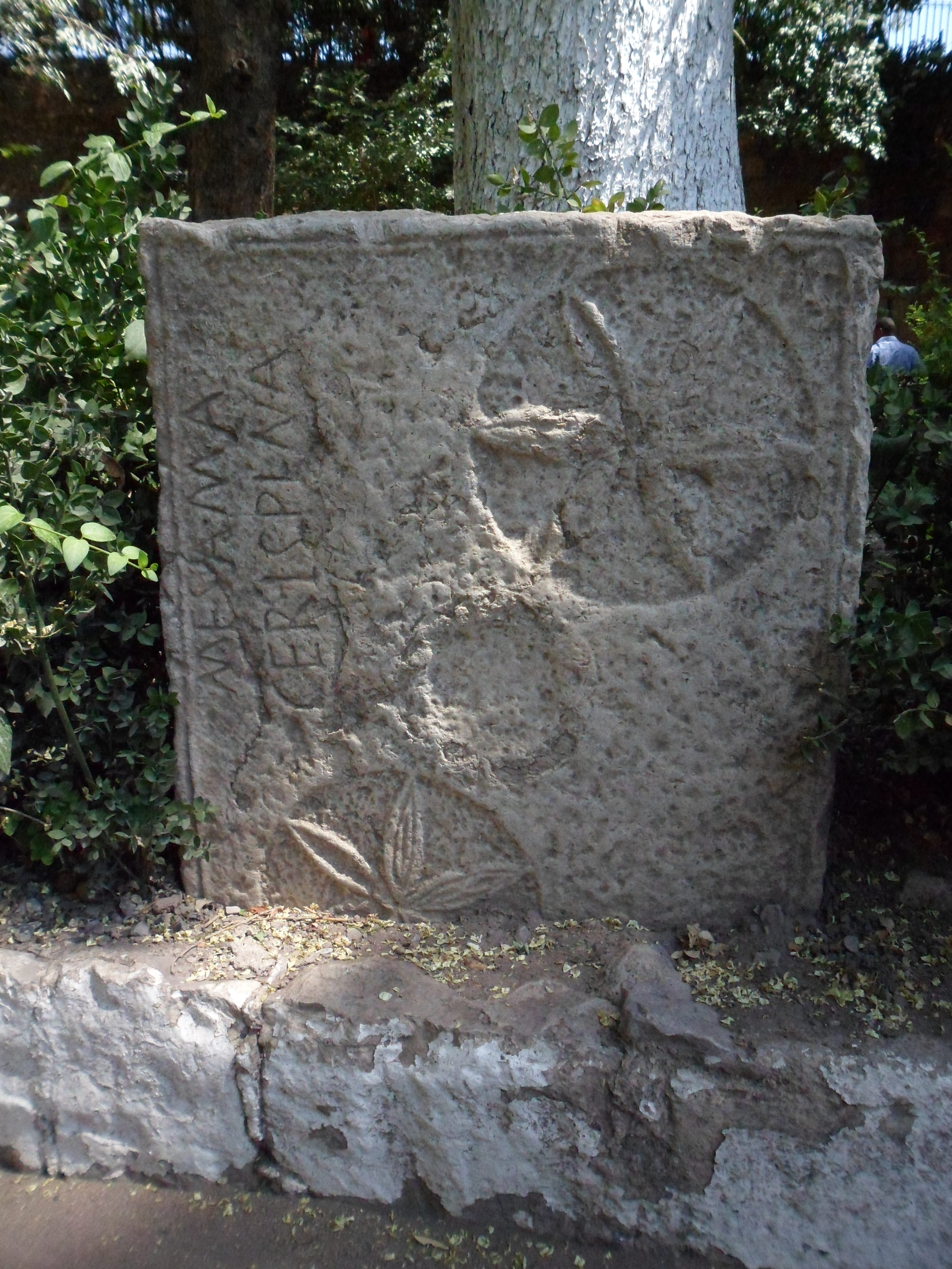 آثار العهد الروماني بسطيف